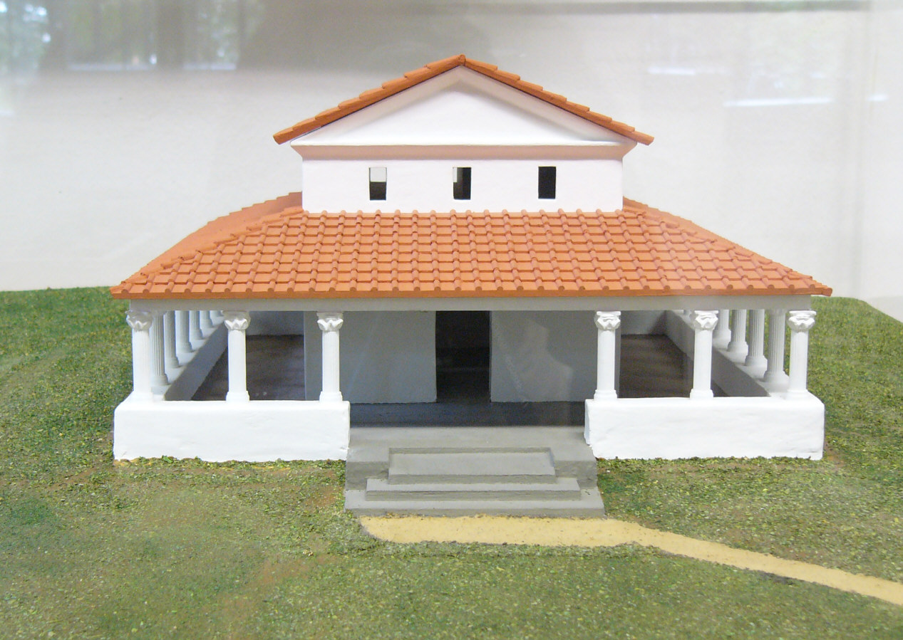 Rekonstruktionsmodell Haupttempelgebäude VARNENVM